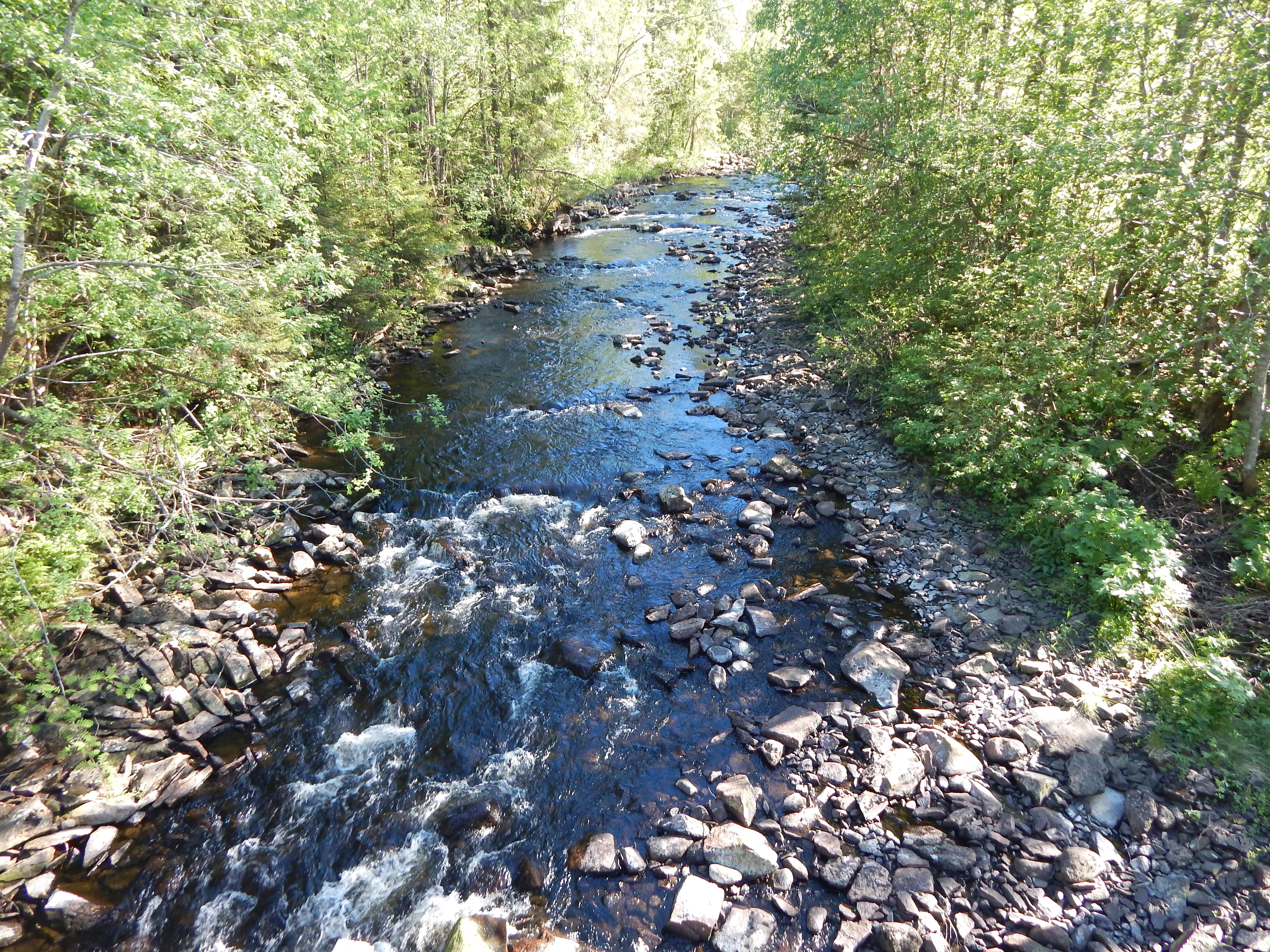 Heggelielva oppstrøms fra Ospeskogveien